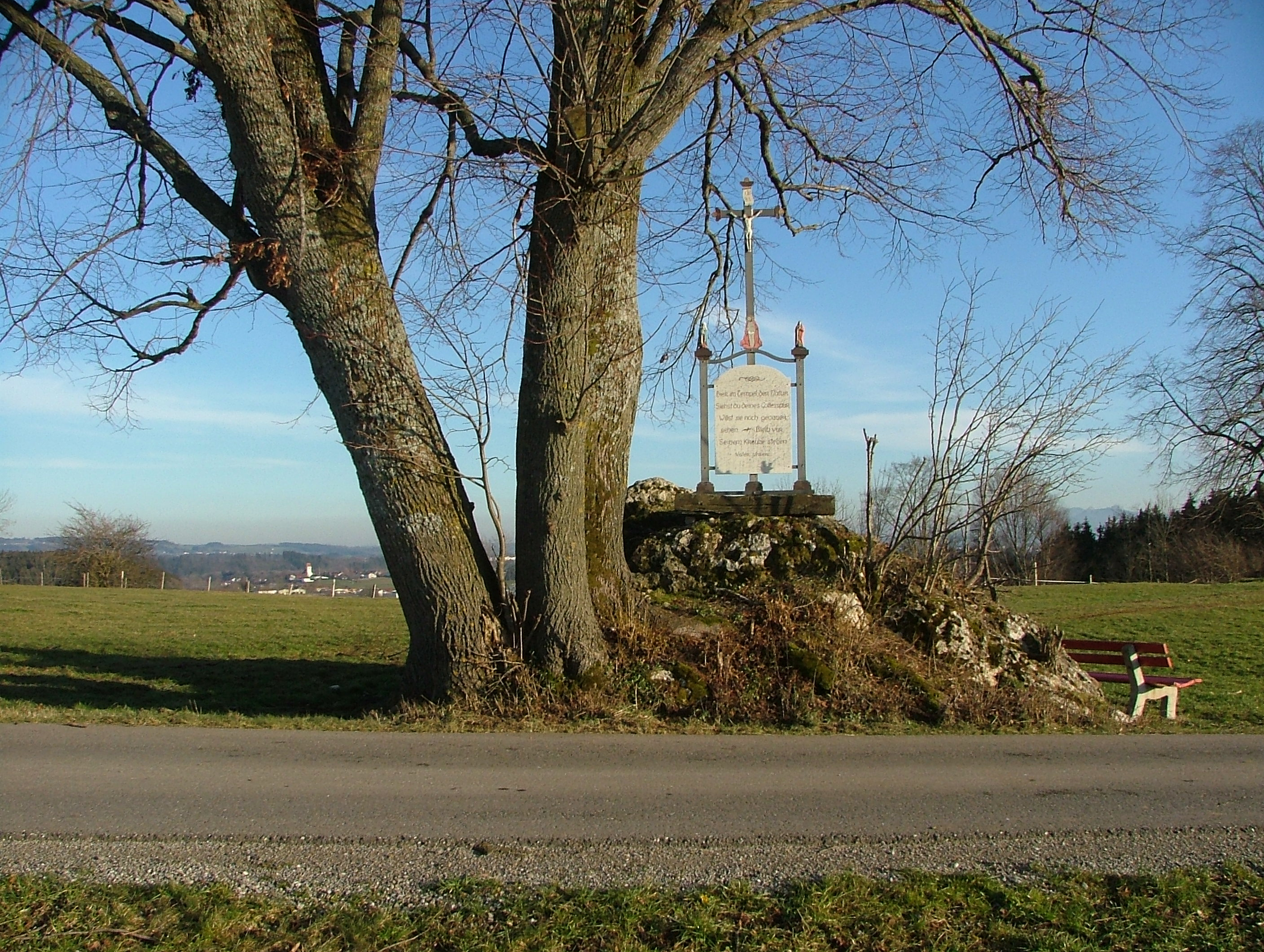 Findling.